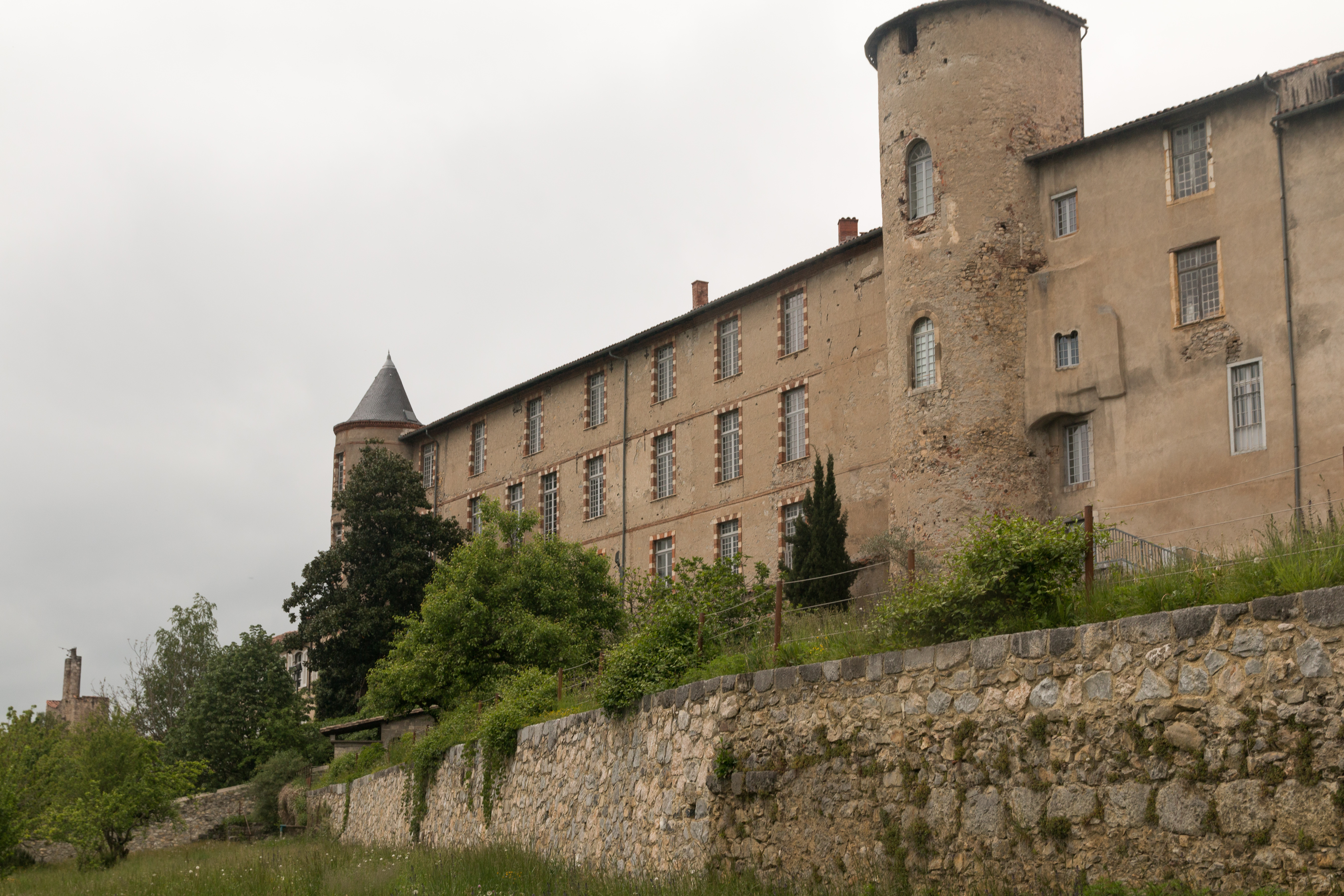 Episcopal Palace